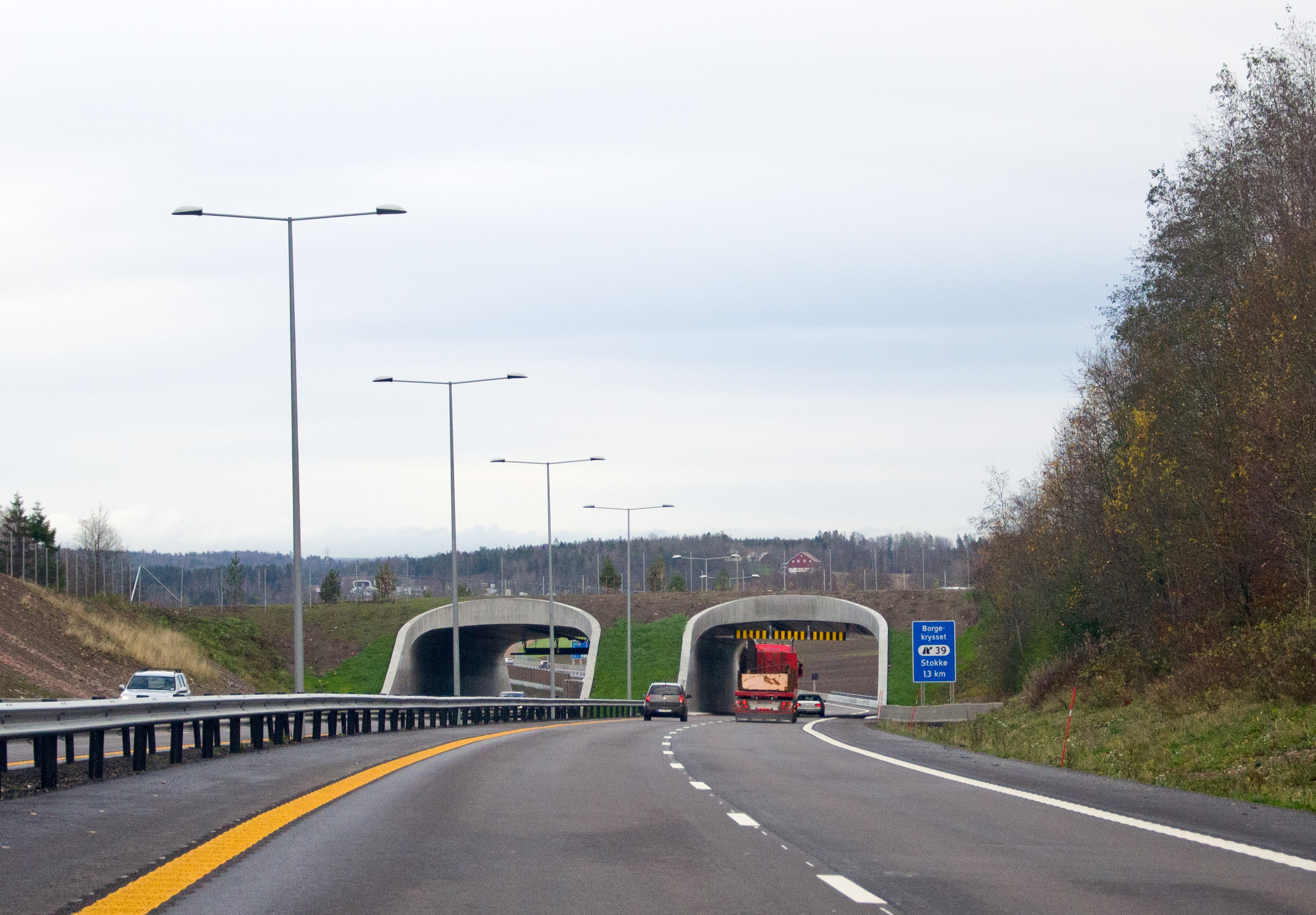 Furulund miljøtunnel på E18 i Vestfold